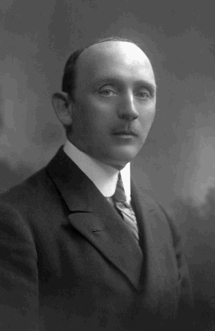 Otokar Chlup (1875 - 1965), Český pedagog.